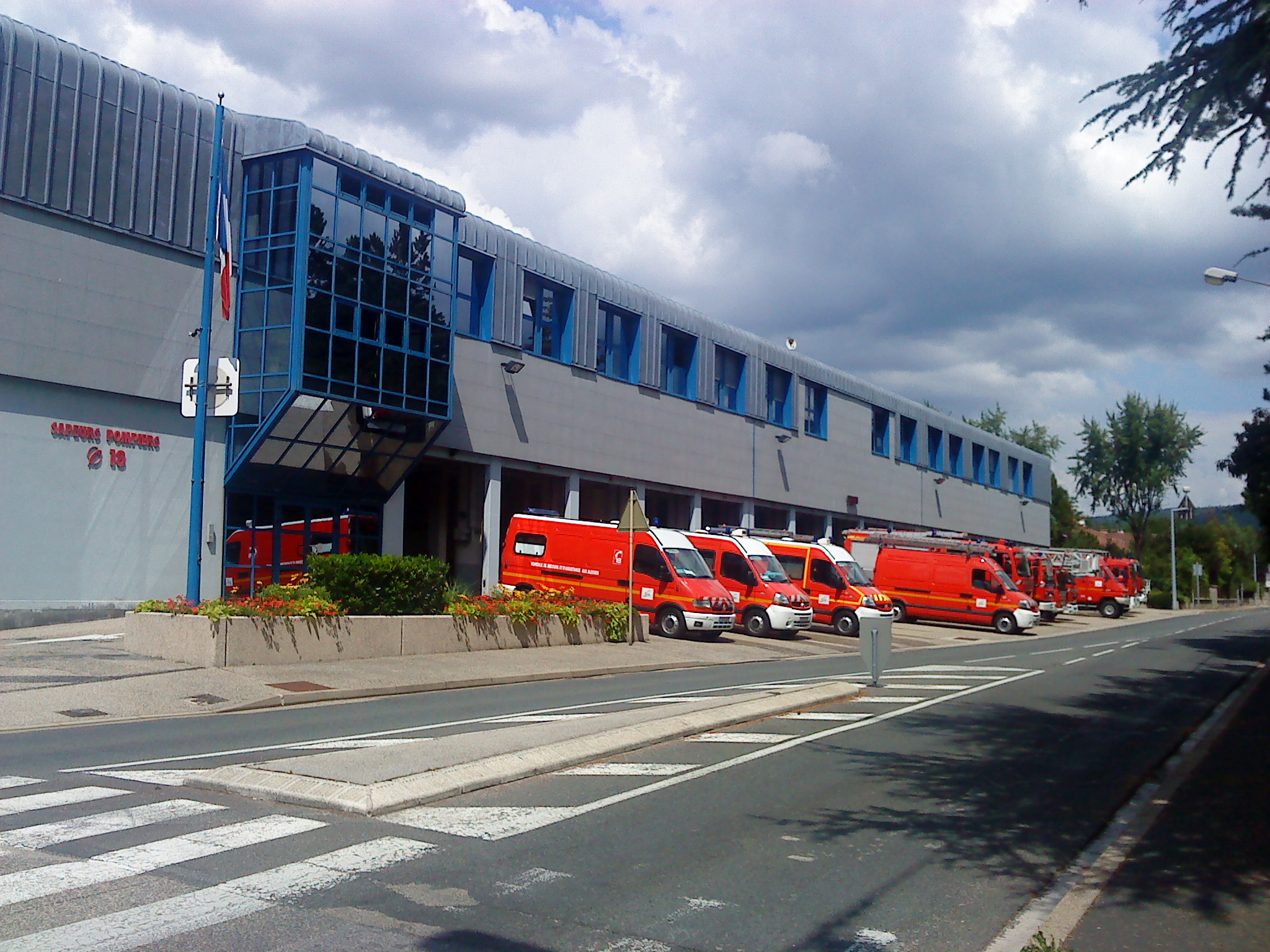 Caserne de pompier de la commune d'Oyonnax